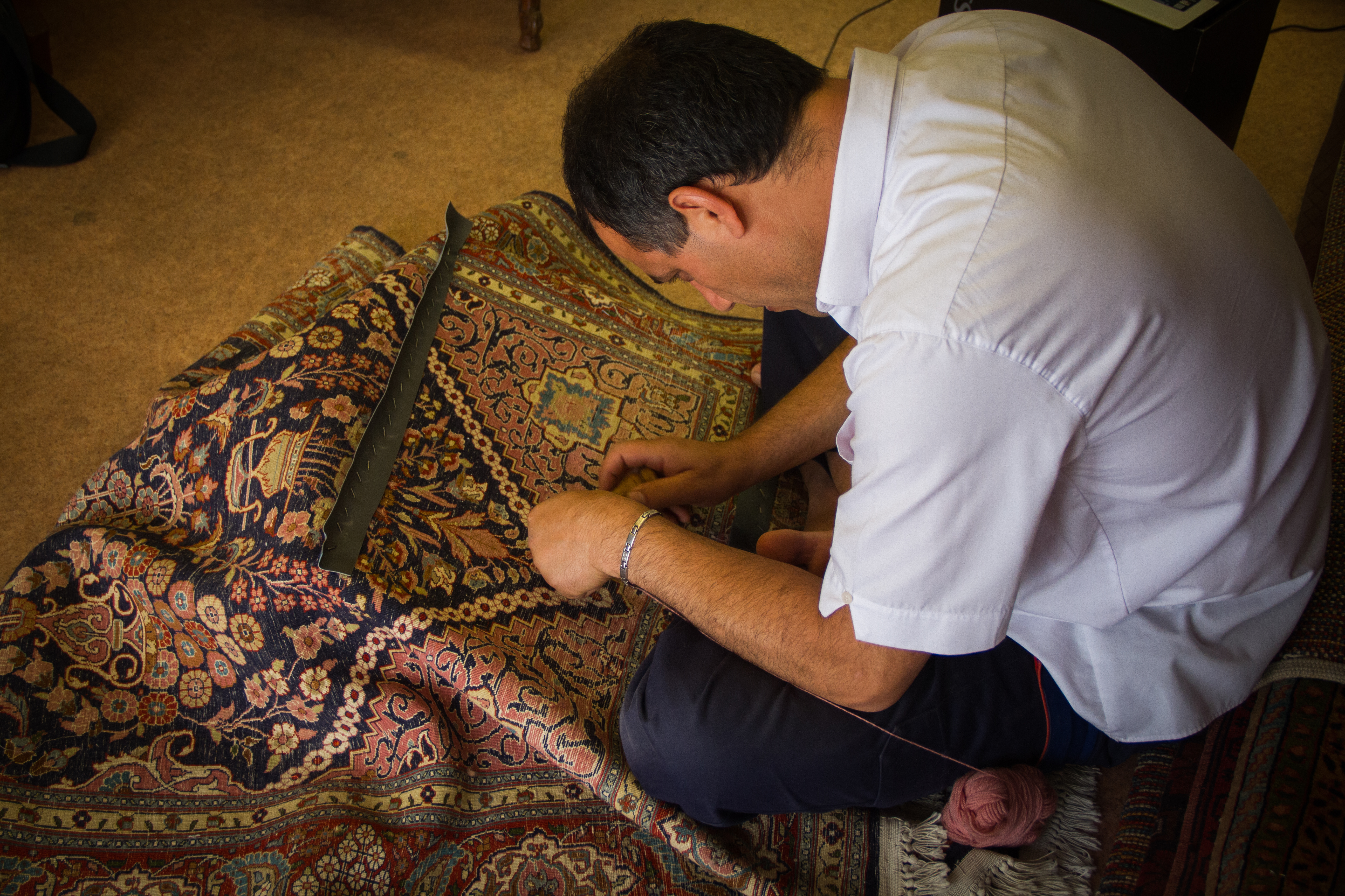 Atelier de restauration de tapis anciens «De fil en aiguille» à Strasbourg.